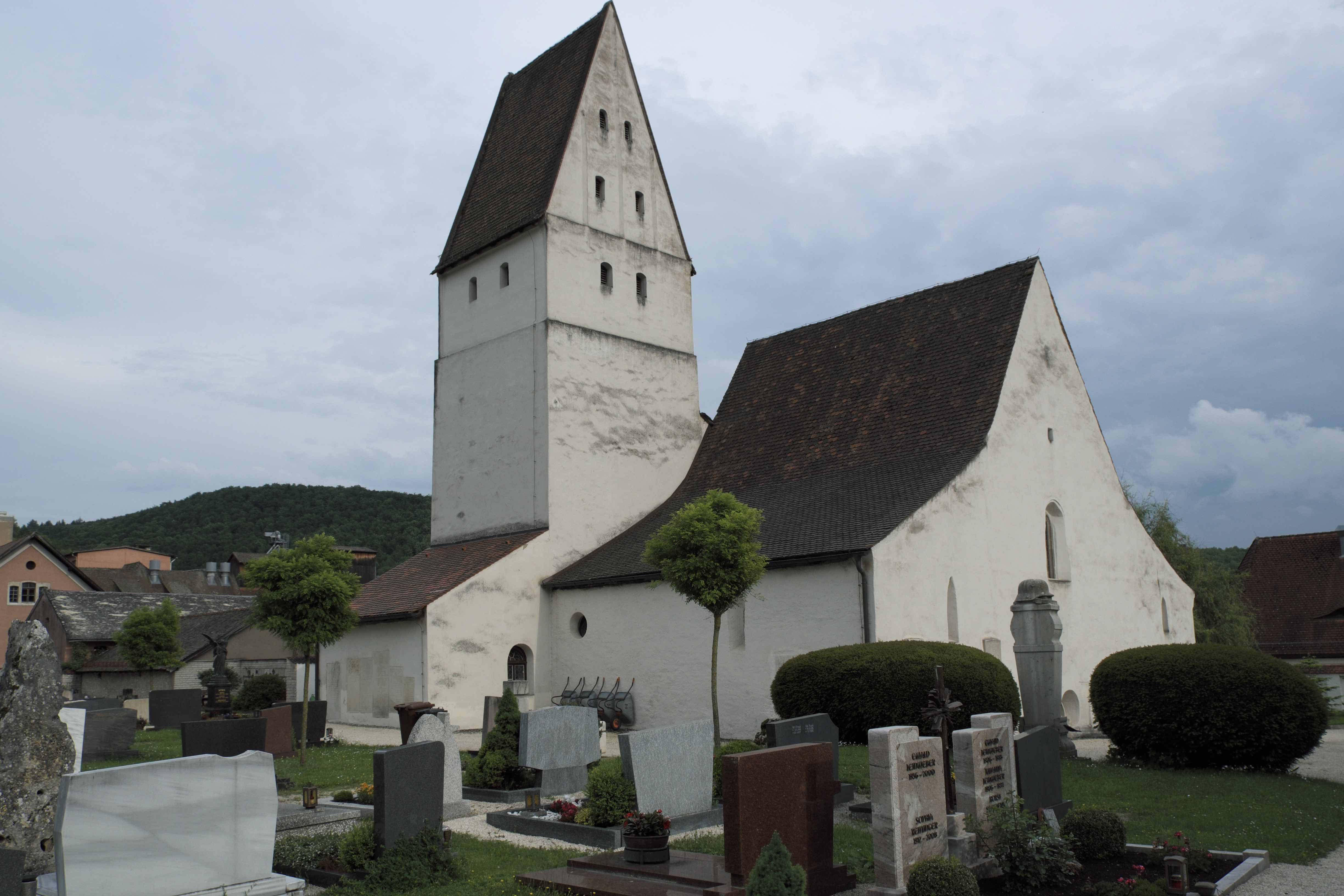 Galluskirche, ehemalige Pfarrkirche, heute Friedhofskirche in Pappenheim im Landkreis Weißenburg-Gunzenhausen (Bayern), aus dem 9. Jahrhundert